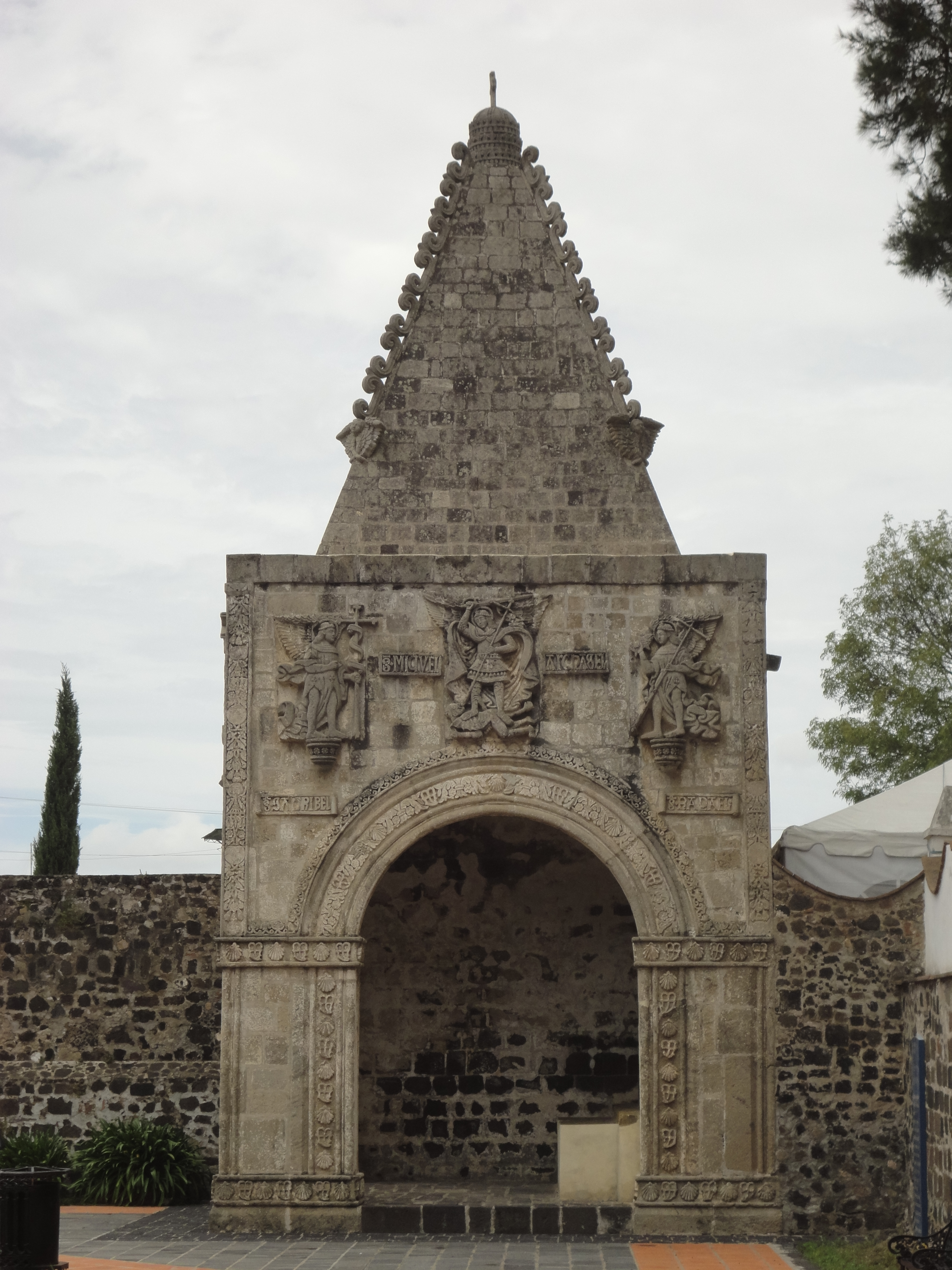 Detalle arquitectónico de capilla poza